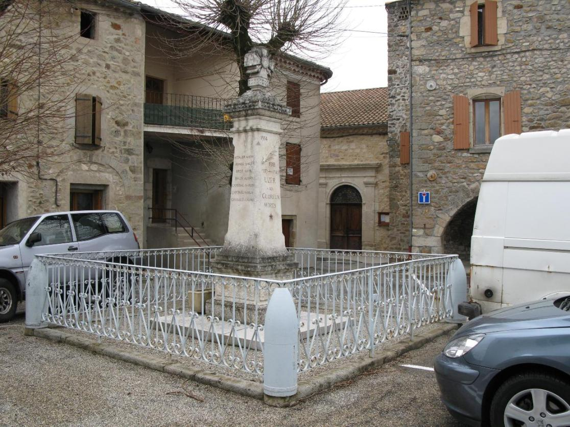 Monument aux morts de Uzer